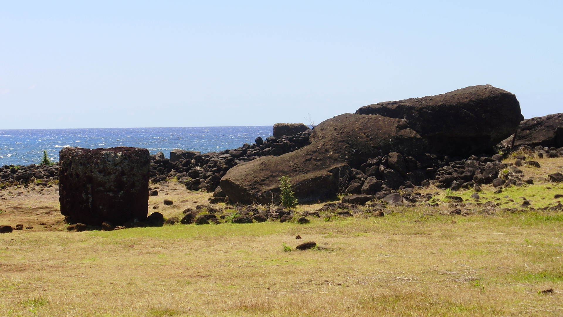 Moái Paro en Ahu Te Pito Kura, isla de Pascua, Chile.